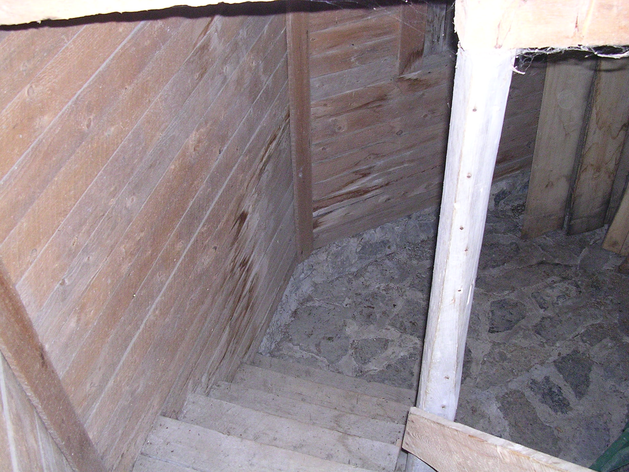 Intérieur du moulin Voyer à Neuville (Québec). Ce moulin est une reconstitution d'un moulin à vent inspiré du moulin à vent de l'Île-aux-Coudres. Le nom Voyer est celui de ses constructeurs.